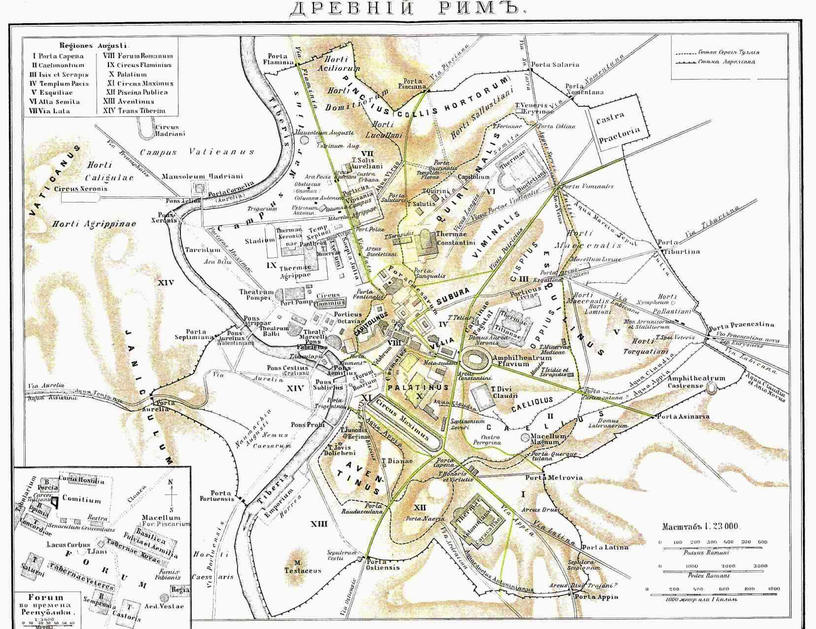 Карта Древнего Рима. Иллюстрация к статье Рим из энциклопедии Брокгауза и Ефрона